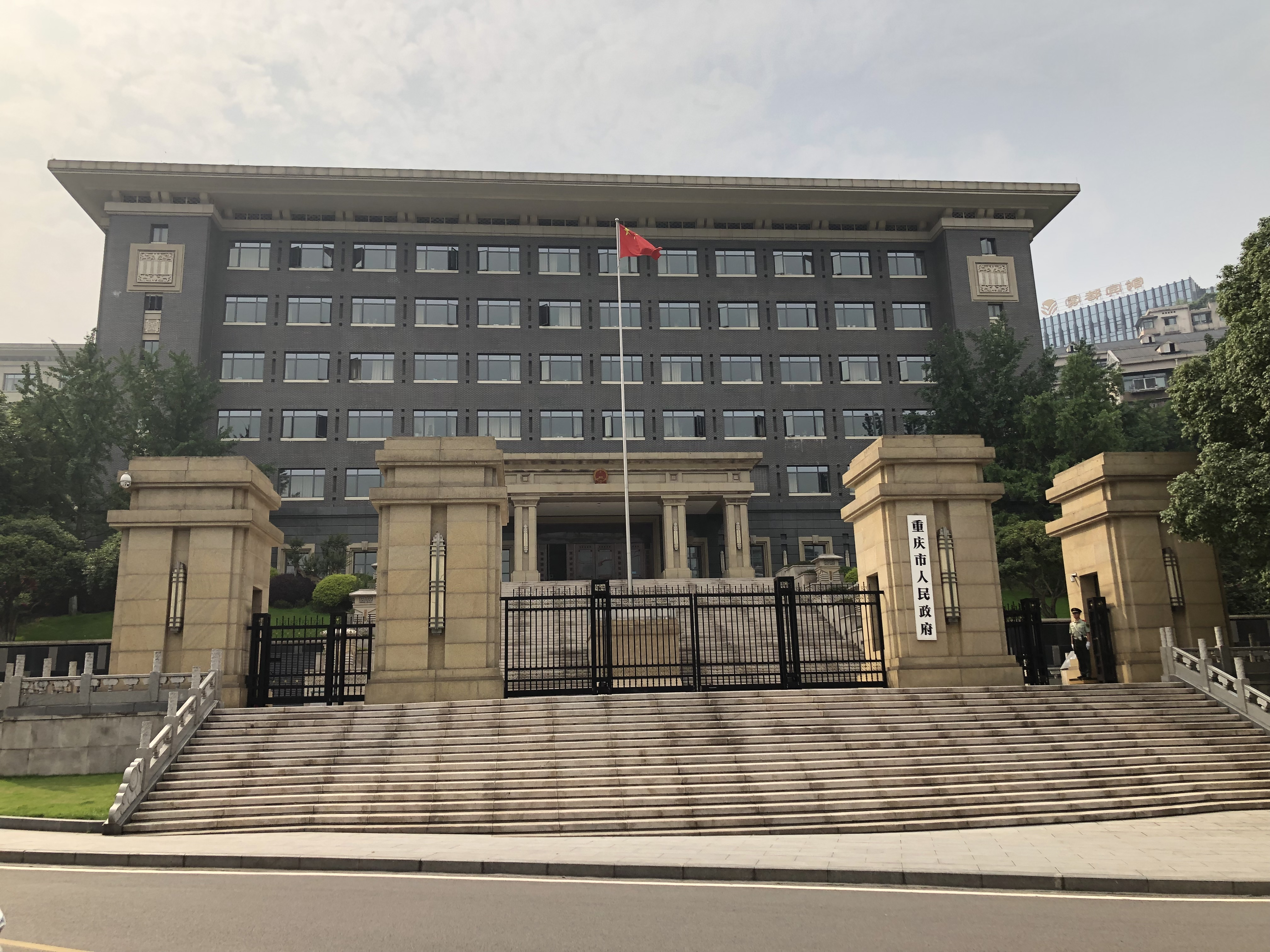 中文（中国大陆）: 重庆市政府